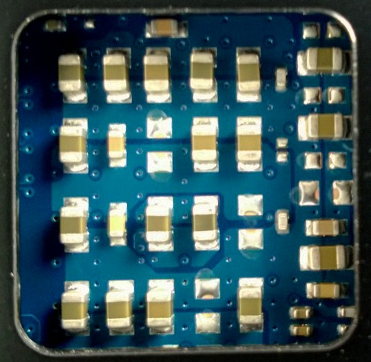 Blockkondensatoren unter einem CPU-Socket